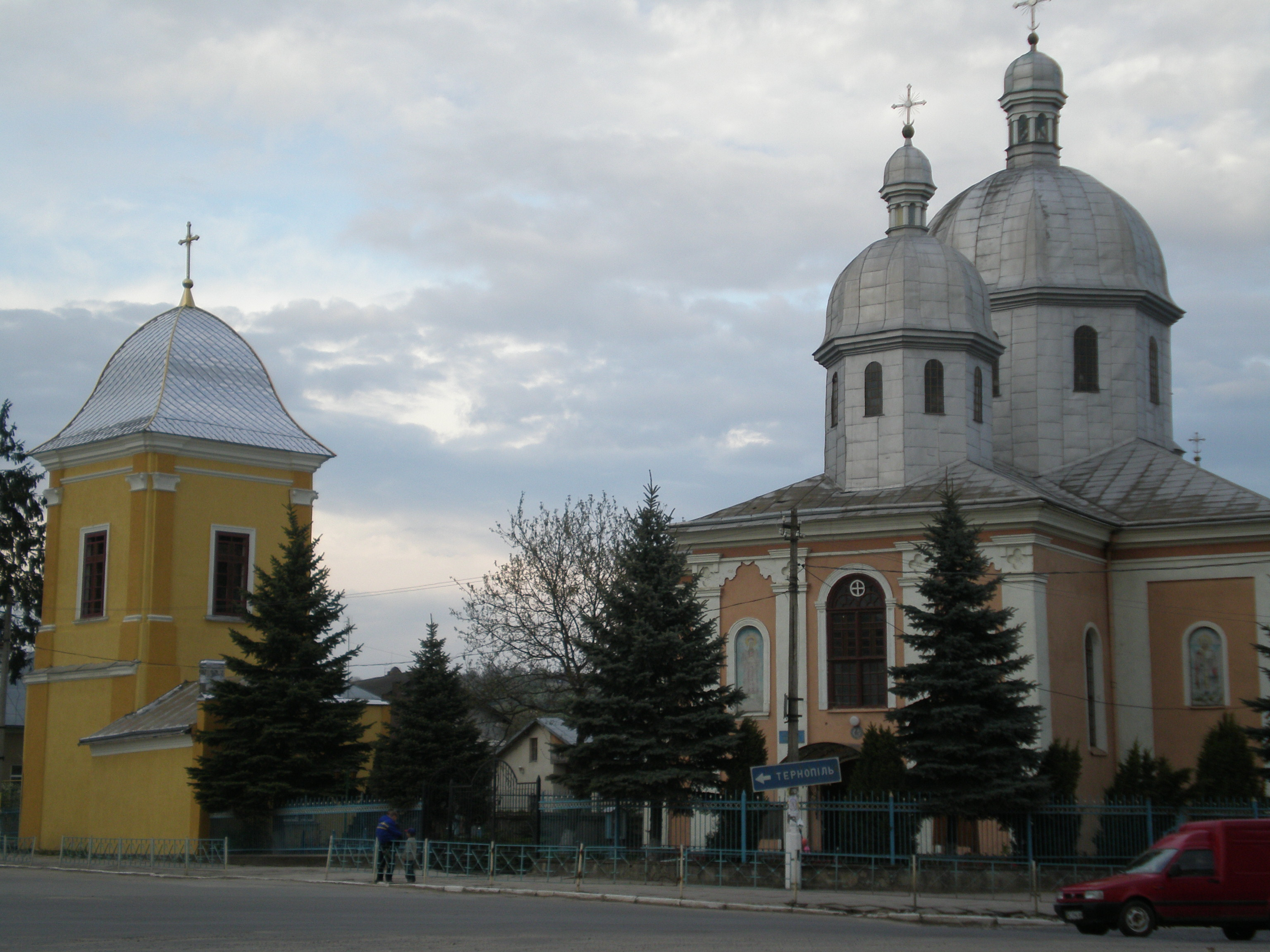 Оборонна церква Cв. Миколи